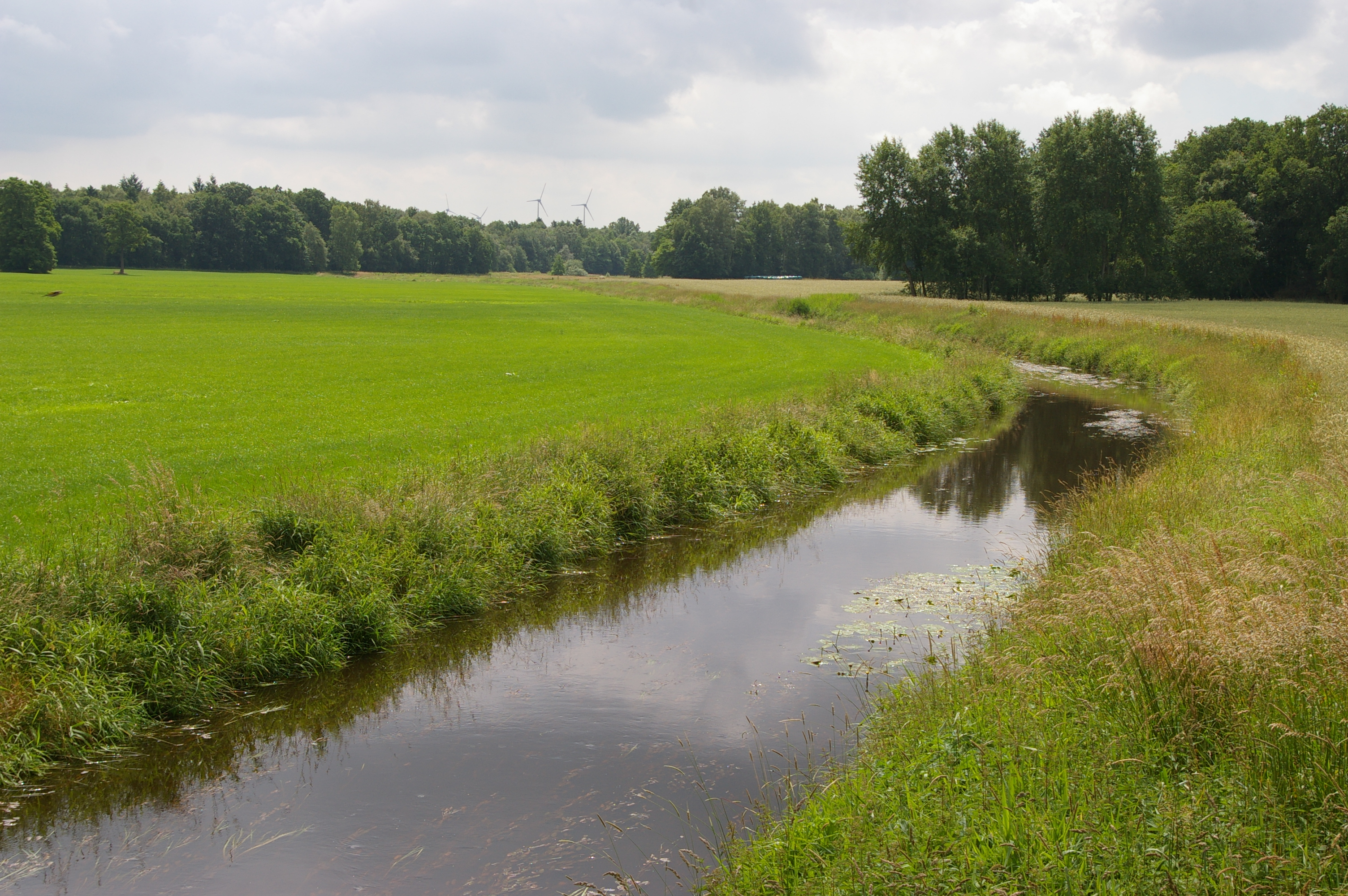 Die kleine Aue bei Sulingen